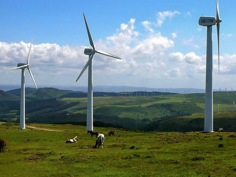 Molinos eólicos en Galicia.